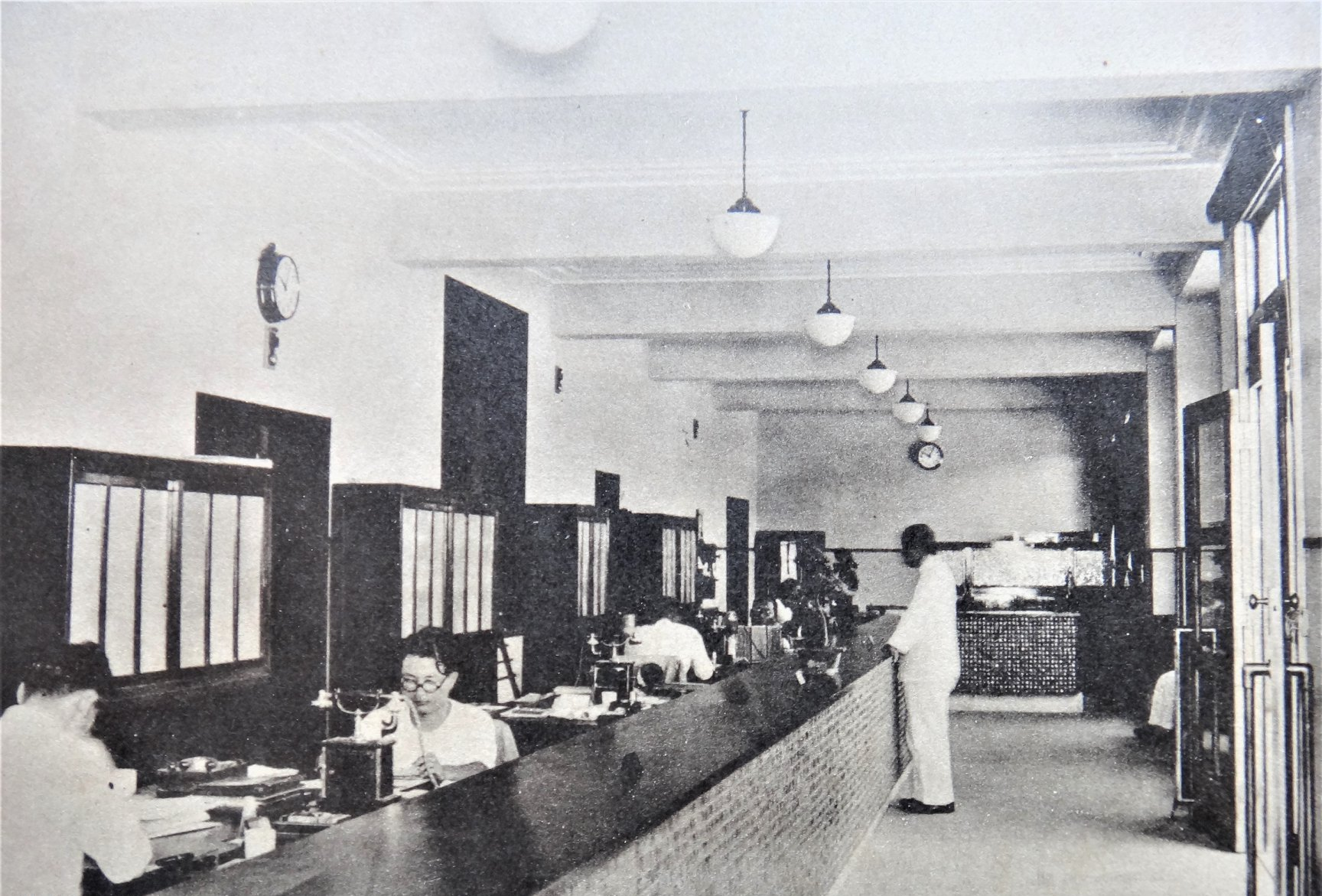 中文（台灣）: 嘉義警察署廳舍（1936年至1937年間竣工，二戰後為嘉義市警察局所用，2000年10月拆除，原地新建嘉義市警察局辦公大樓）內一景。